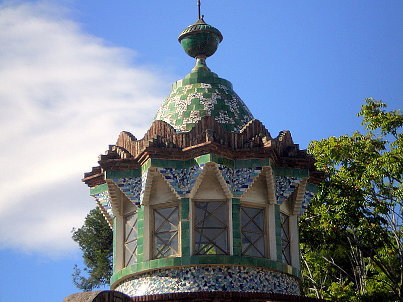 Pavellons de la finca Güell